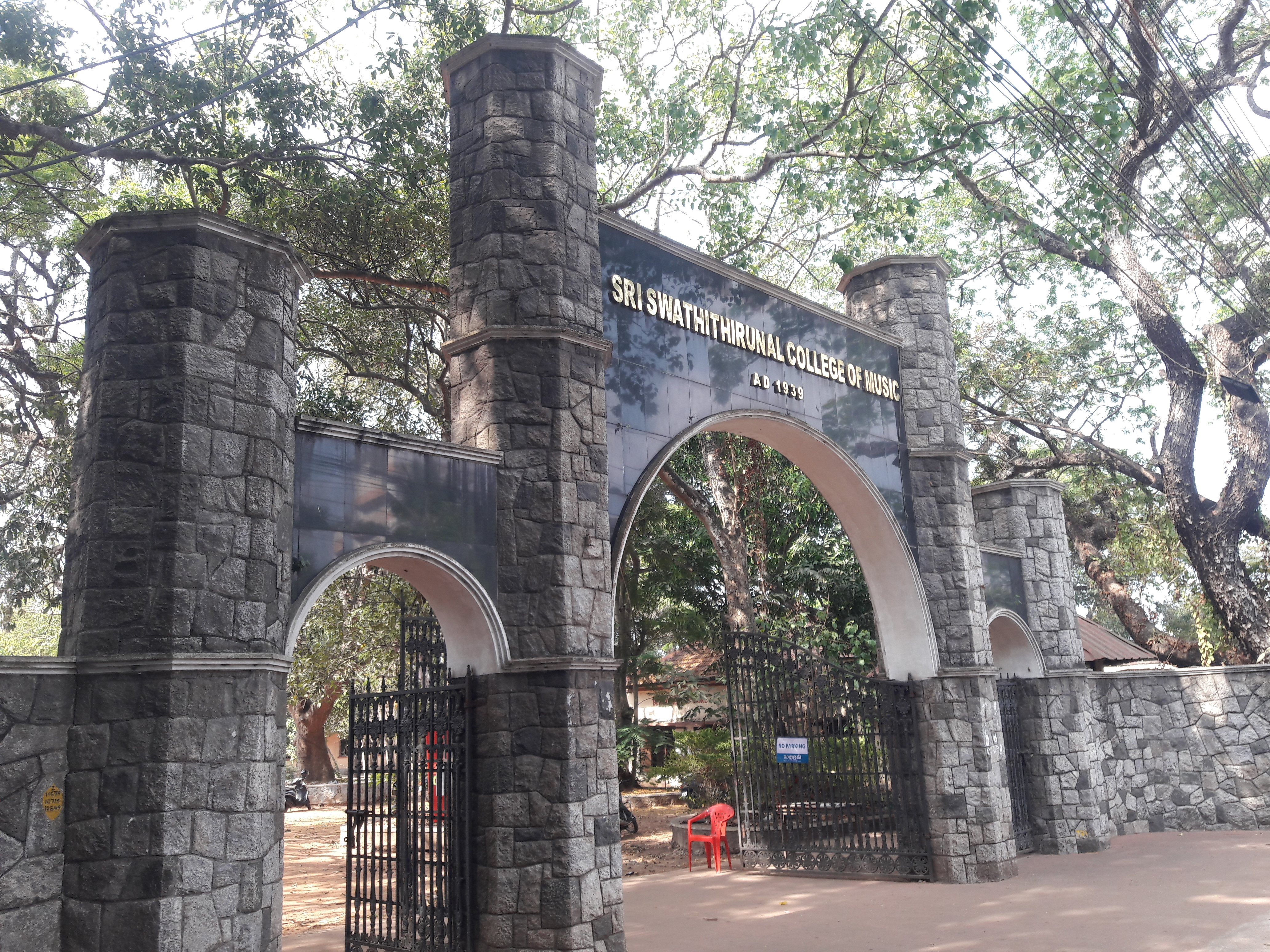 സ്വാതിതിരുനാൾ സംഗീത അക്കാദമിയുടെ കവാടം.